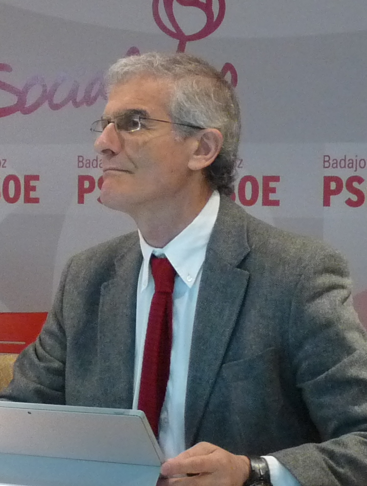 Las Jornadas de Sanidad Pública “Ernest Lluch”, han tenido lugar en la Sede Provincial del PSOE de Badajoz. La inauguración de las jornadas las ha efectuado de la Secretaria Federal de Sanidad del PSOE, María José Sánchez, y del Secretario General del PSOE de Extremadura, Guillermo Fernández Vara. En las Mesas Debate de las Jornadas de Sanidad Pública también participarán el Secretario de Sanidad del PSOE de Extremadura, José María Vergeles, el especialista en Salud Pública y miembro del panel de expertos de la Comisión Europea en Políticas de Salud, Fernando Lamata, y el Presidente del Colegio Oficial de Médicos de la Provincia de Badajoz, Pedro Hidalgo, entre otros. Cabe destacar que es la tercera edición de las Jornadas de Sanidad Pública llevadas a cabo por el PSOE de Extremadura. Anteriormente, se celebraron en Mérida y en Cáceres.